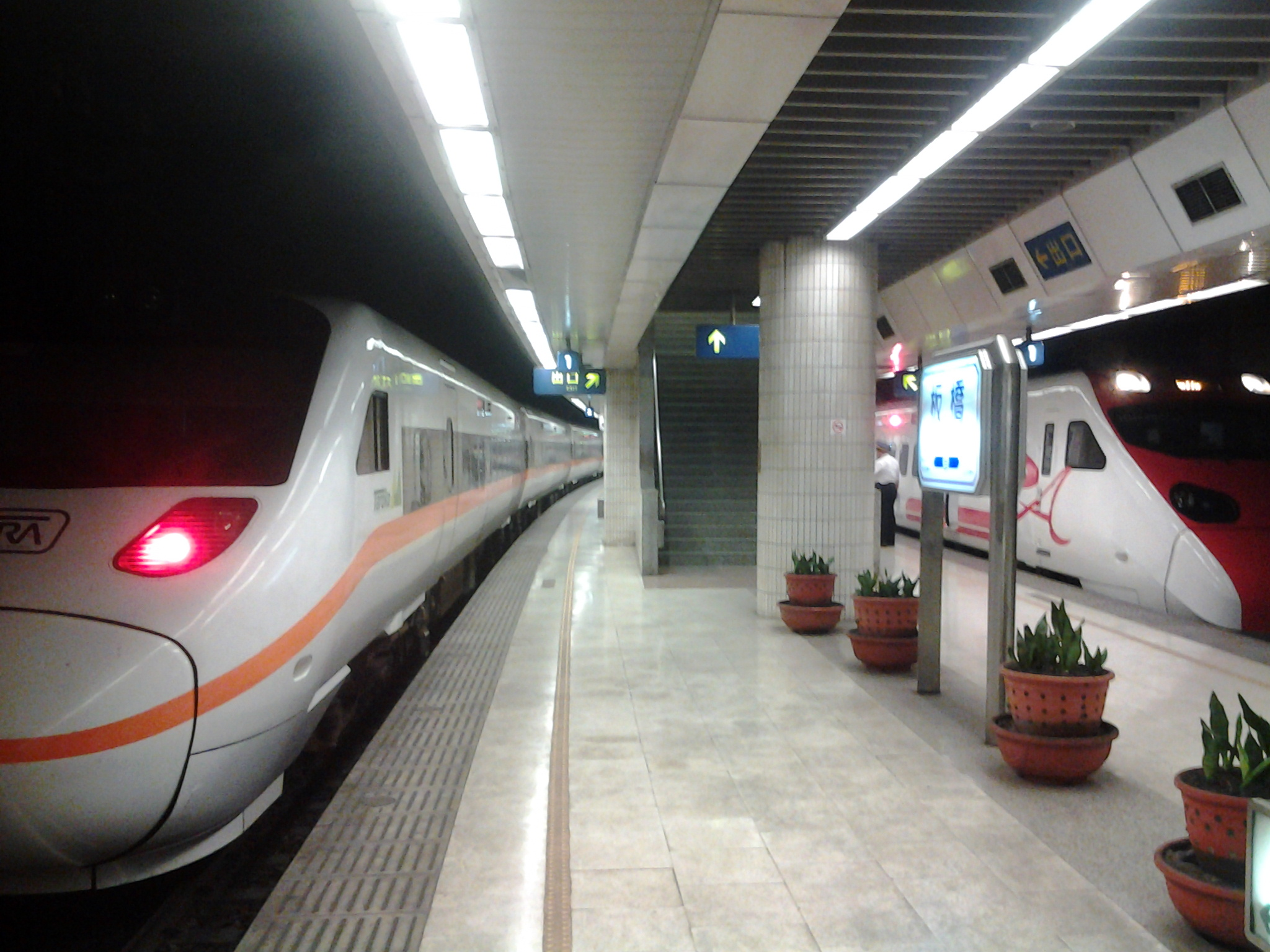 同時停在板橋站第1月臺的TEMU1000型太魯閣列車與TEMU2000型普悠瑪列車。